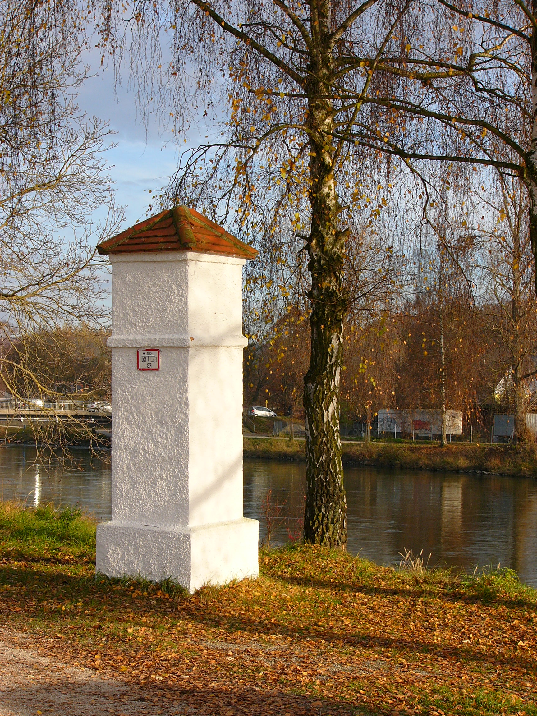 XI. Burgfriedenssäule mit Marmorwappen von 1766, steht am Isarweg westlich der Adenauer-Brücke This is a photograph of an architectural monument.